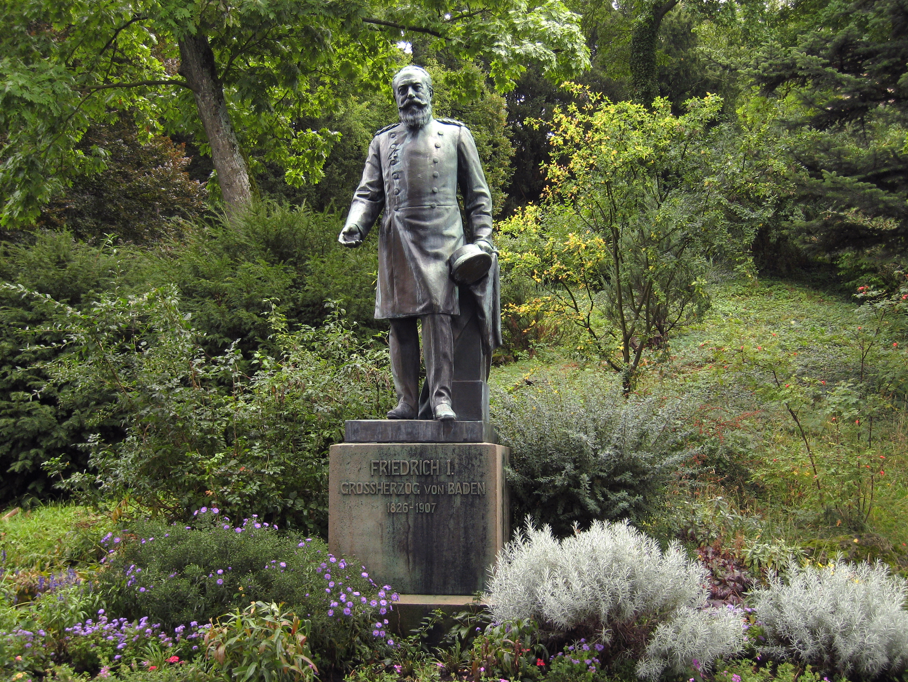 Denkmal für Großherzog Friedrich I. auf der Westseite des Burgberges in Badenweiler. Badenweiler/Süd-Schwarzwald/Deutschland